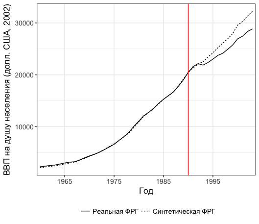 Сравнение реального благосостояния ФРГ после объединения и гипотетического, если бы объединения не состоялось. Источник: Abadie, Alberto, Alexis Diamond, and Jens Hainmueller. 2015. “Comparative Politics and the Synthetic Control Method.” American Journal of Political Science 59 (2): 495-510. Источник для данных для репликации